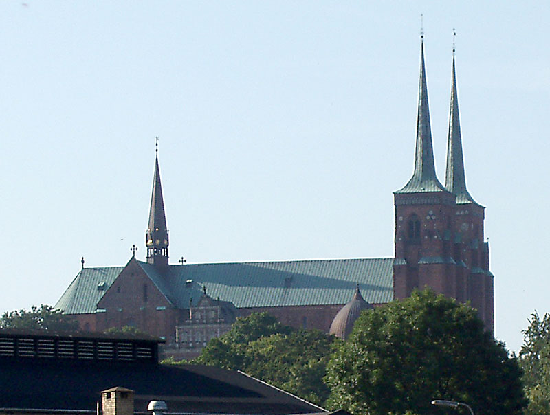 Roskilde Domkirke set fra nord